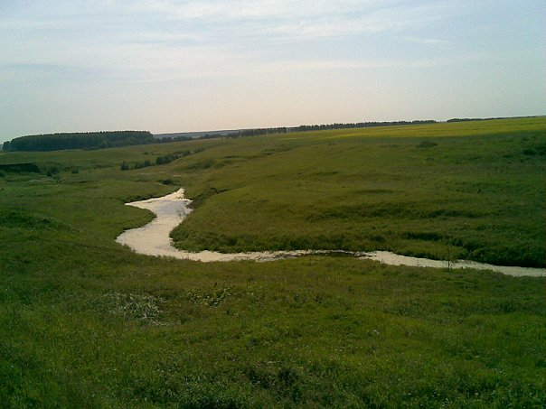 Овраги